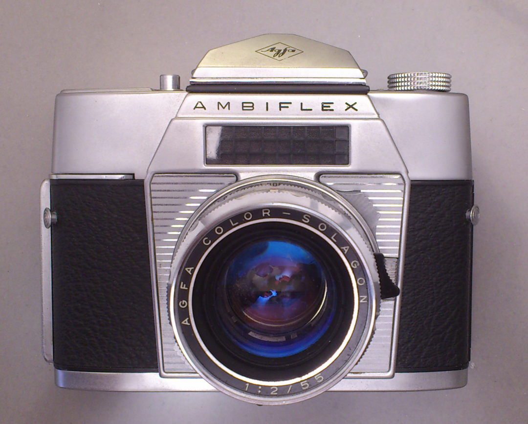 Frontalansicht: Agfa Ambiflex 1959 Camera-Werk-Muenchen